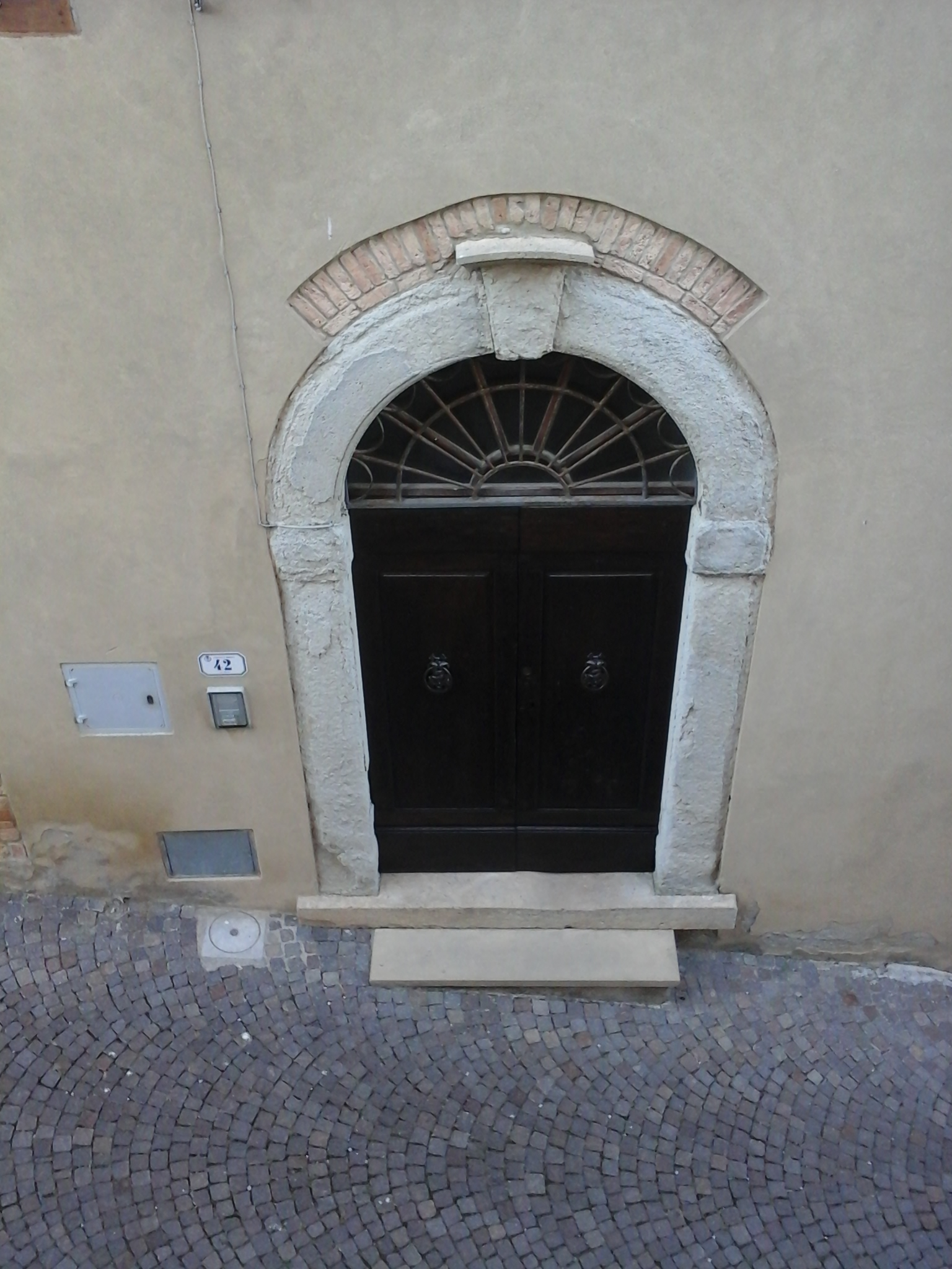 Portone del numero 42 di via Piave a Bibblona (LI)